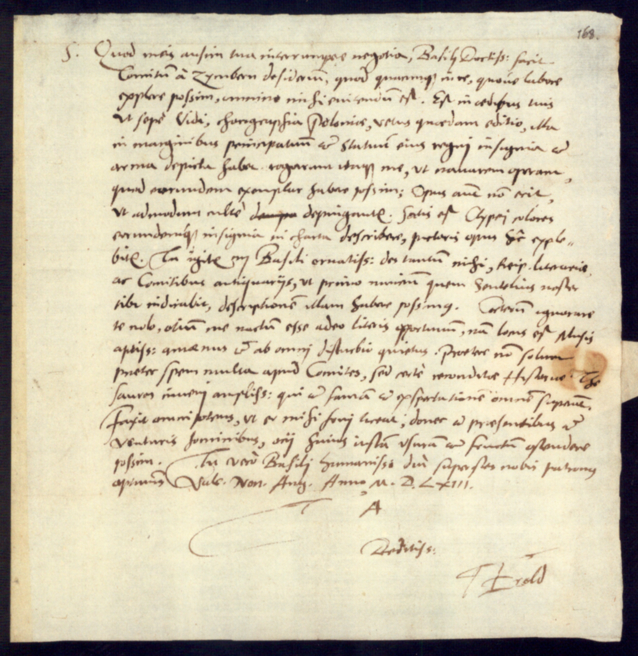 Johann Basilius Herold (Historiker in Basel) schreibt an den Drucker Basilius Amerbach; Erwähnung der von Herold 1563 besuchten Grafen Wihelm Werner und Froben Christoph von Zimmern als "comites antiquarii"; Universitätsarchiv Basel